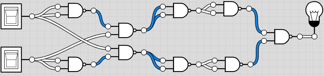 cicuito simmples feito só com nand